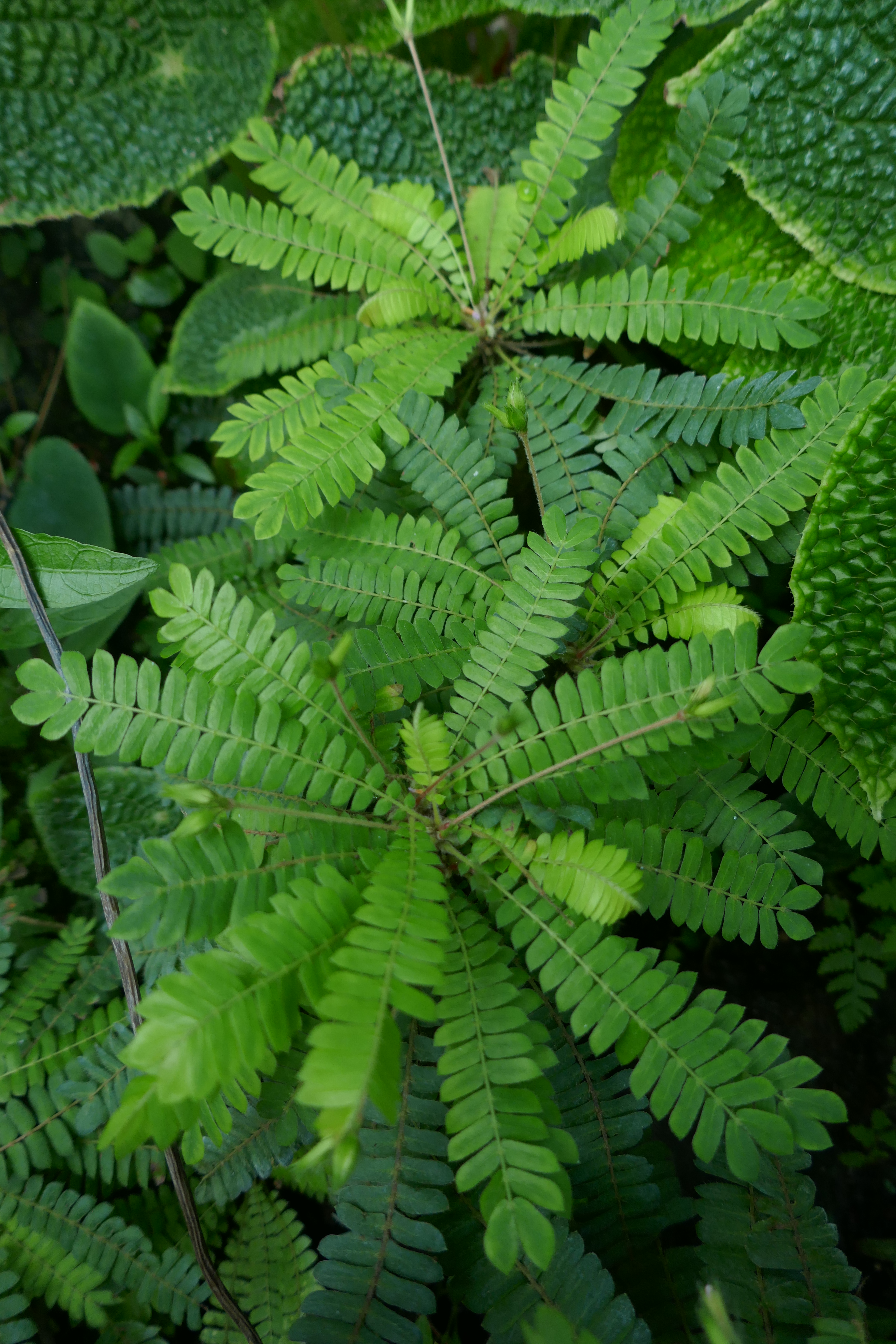 Afrique et Asie tropicales. Biophytum sensitivum (L.) DC. Jardin botanique Jean-Marie Pelt, Villers-lès-Nancy.